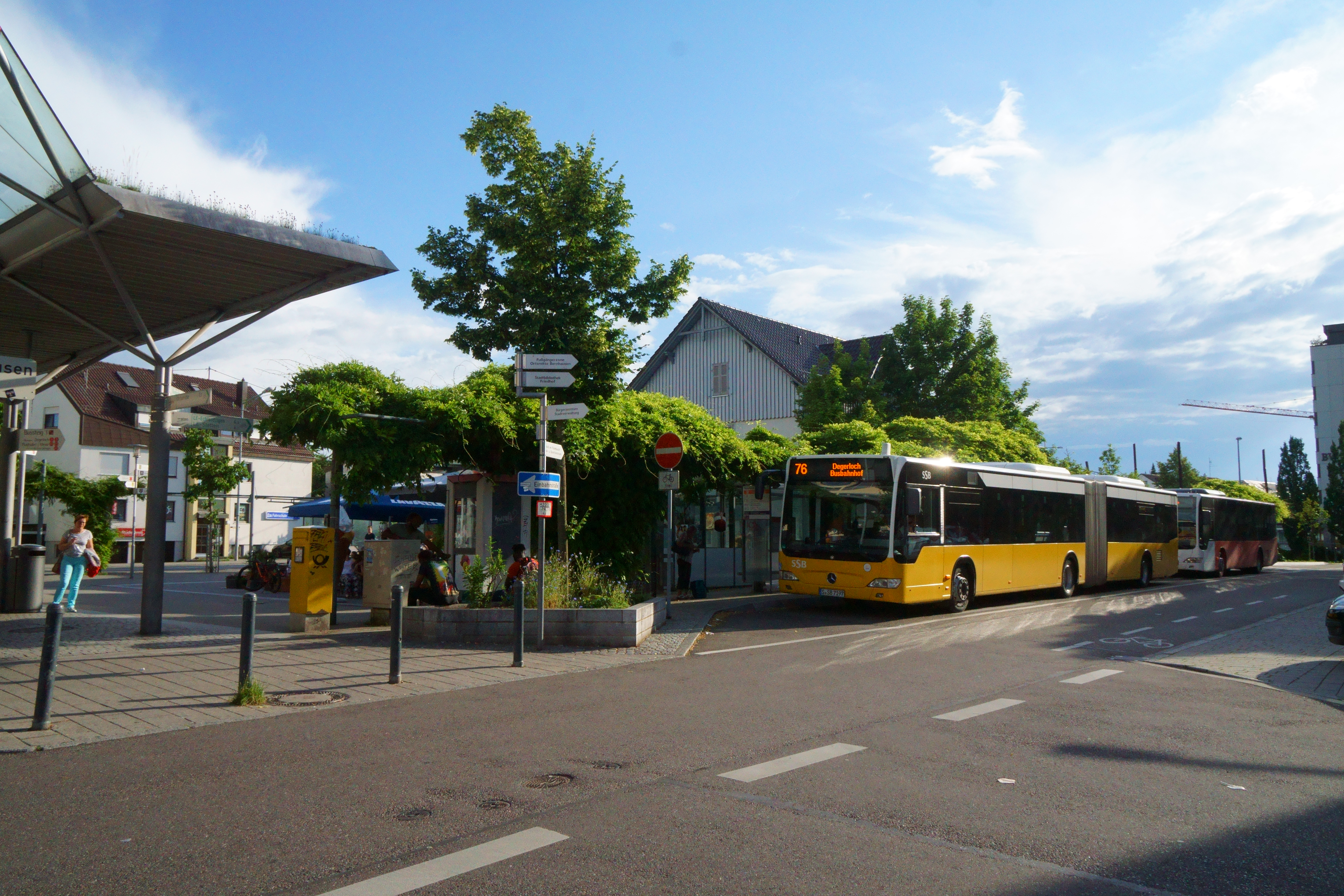 Bahnhof Filderstadt in Filderstadt Bernhausen